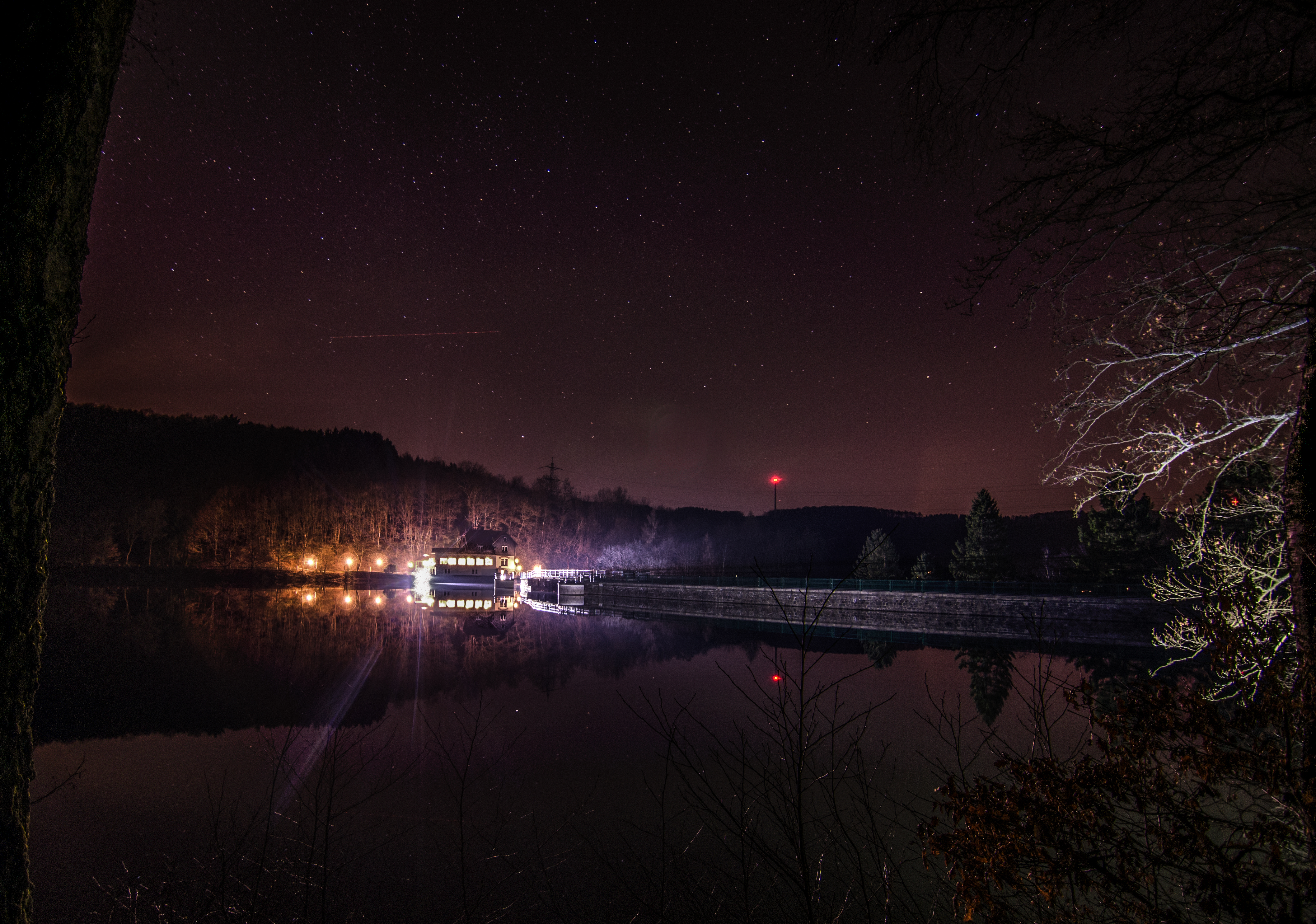 Die Staumauer der Oestertalsperre neben dem "Hotel zur Oestertalsperre"